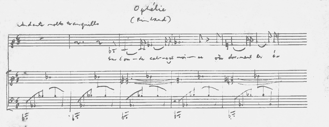 Le début de la mélodie de Pál Hermann Ophélie, composée pendant la Seconde Guerre mondiale à Toulouse.